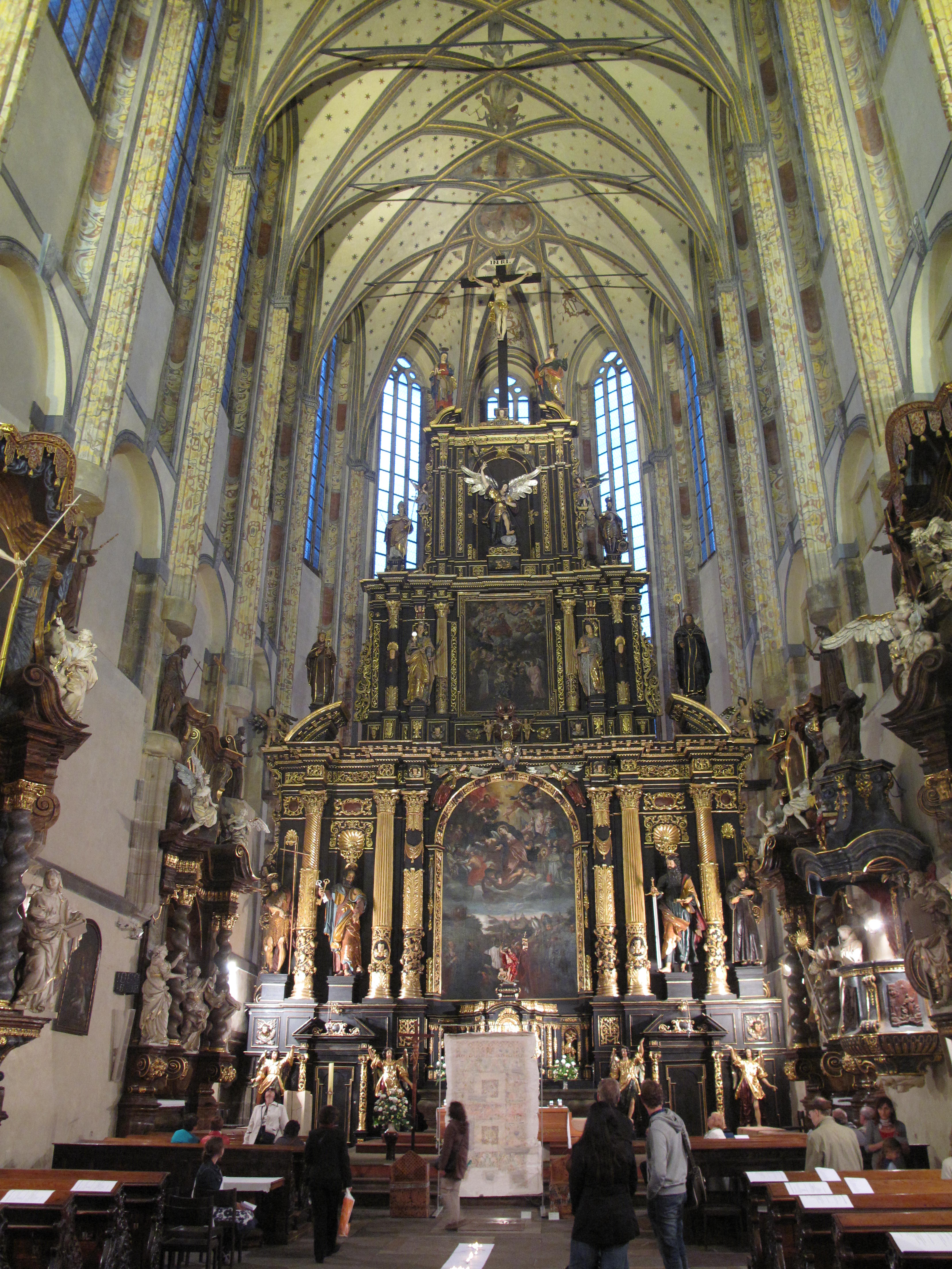 Kostel Panny Marie Sněžné, Noc kostelů 2011